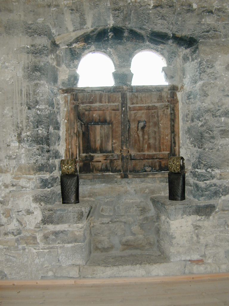 Interior de la ventana situada en la torre de Casa Buil de San Vicente de Labuerda, provincia de Huesca